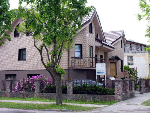 Gyd. A.Gailiaus klinika Mažeikiuose Foto: Algirdas, 2006 m. birželio 8 d.